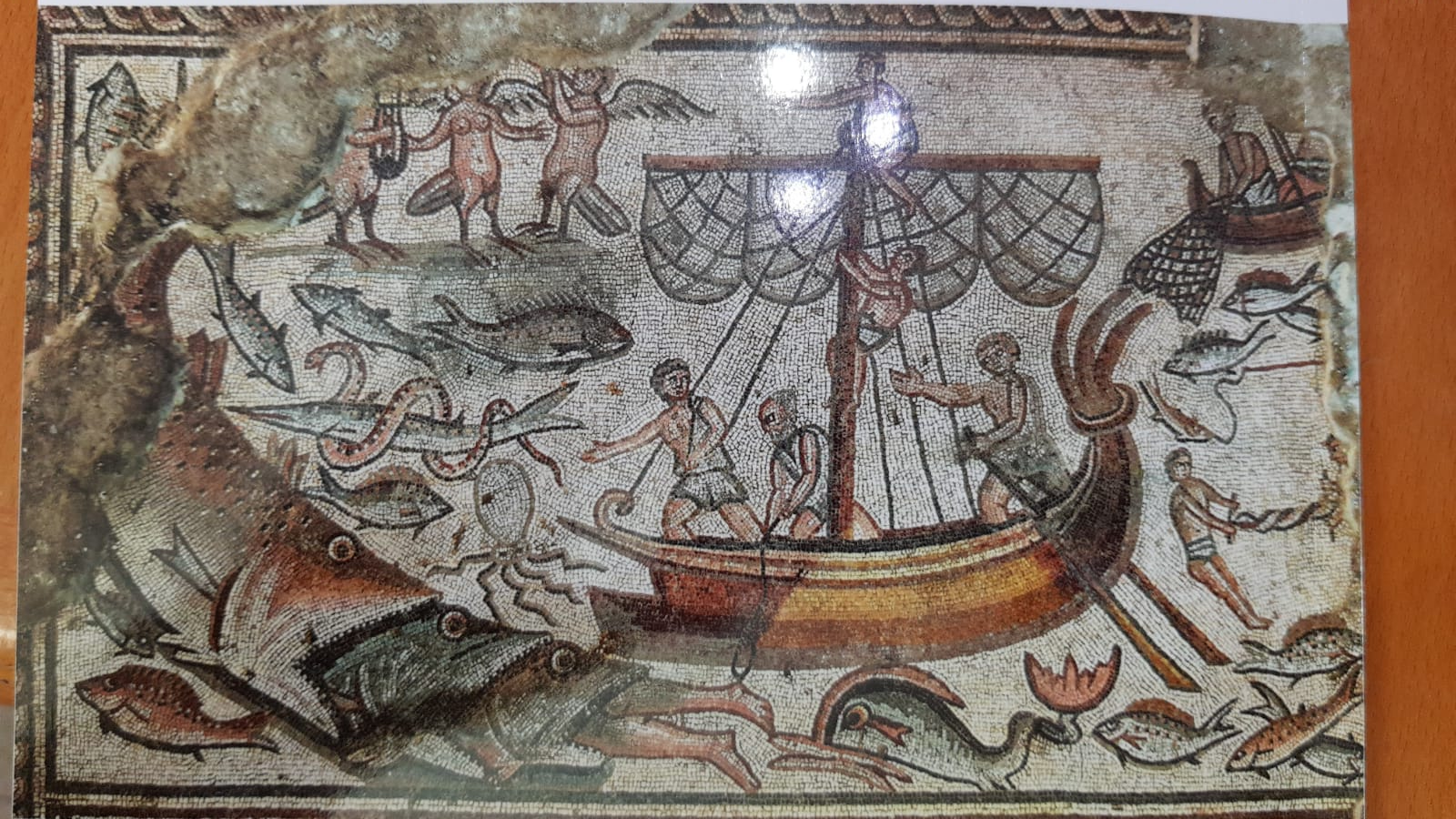 פסיפס המתאר ספינה דומה העושה שימוש במפרש מרובע